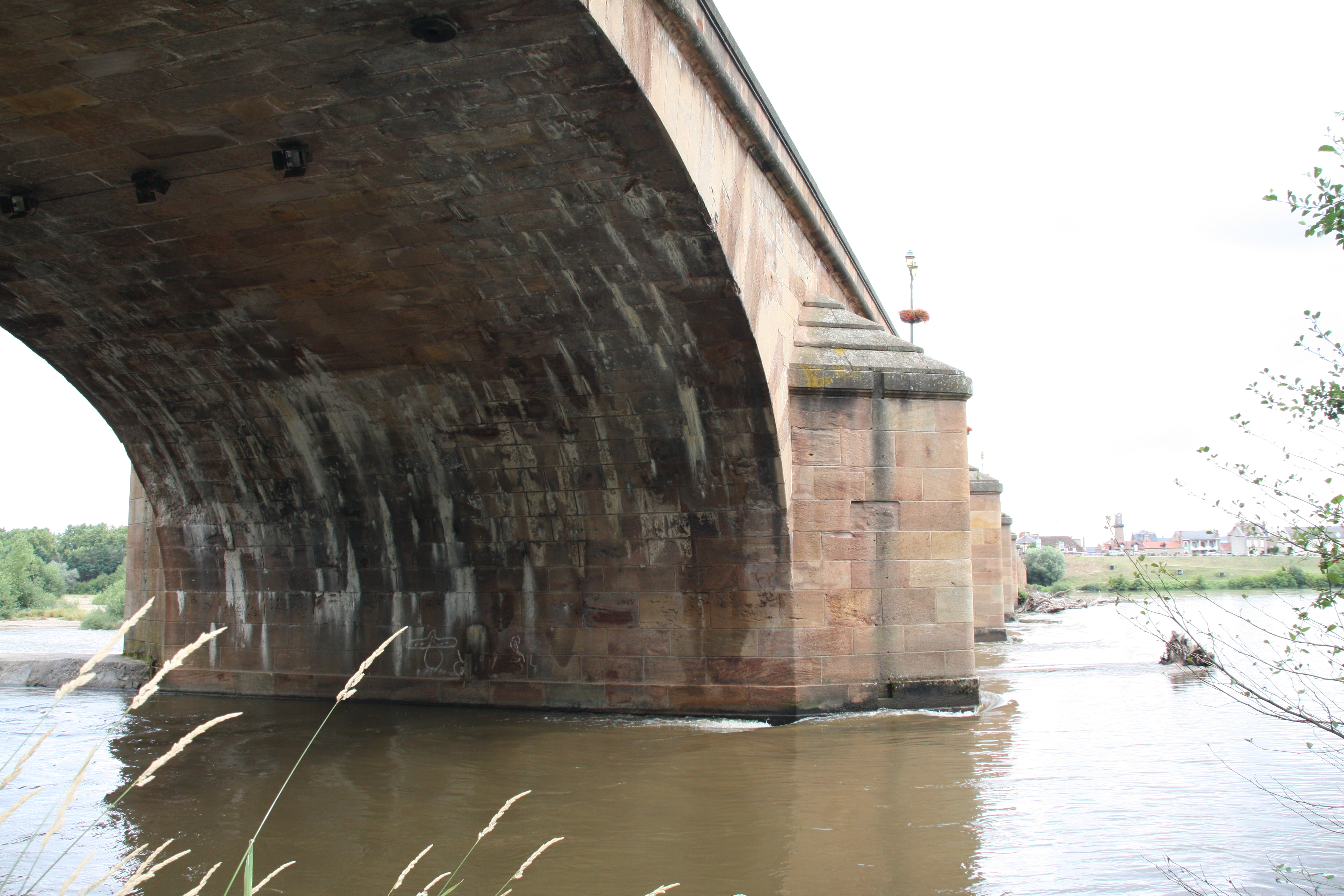 Le Pont Régemortes à Moulins, France.